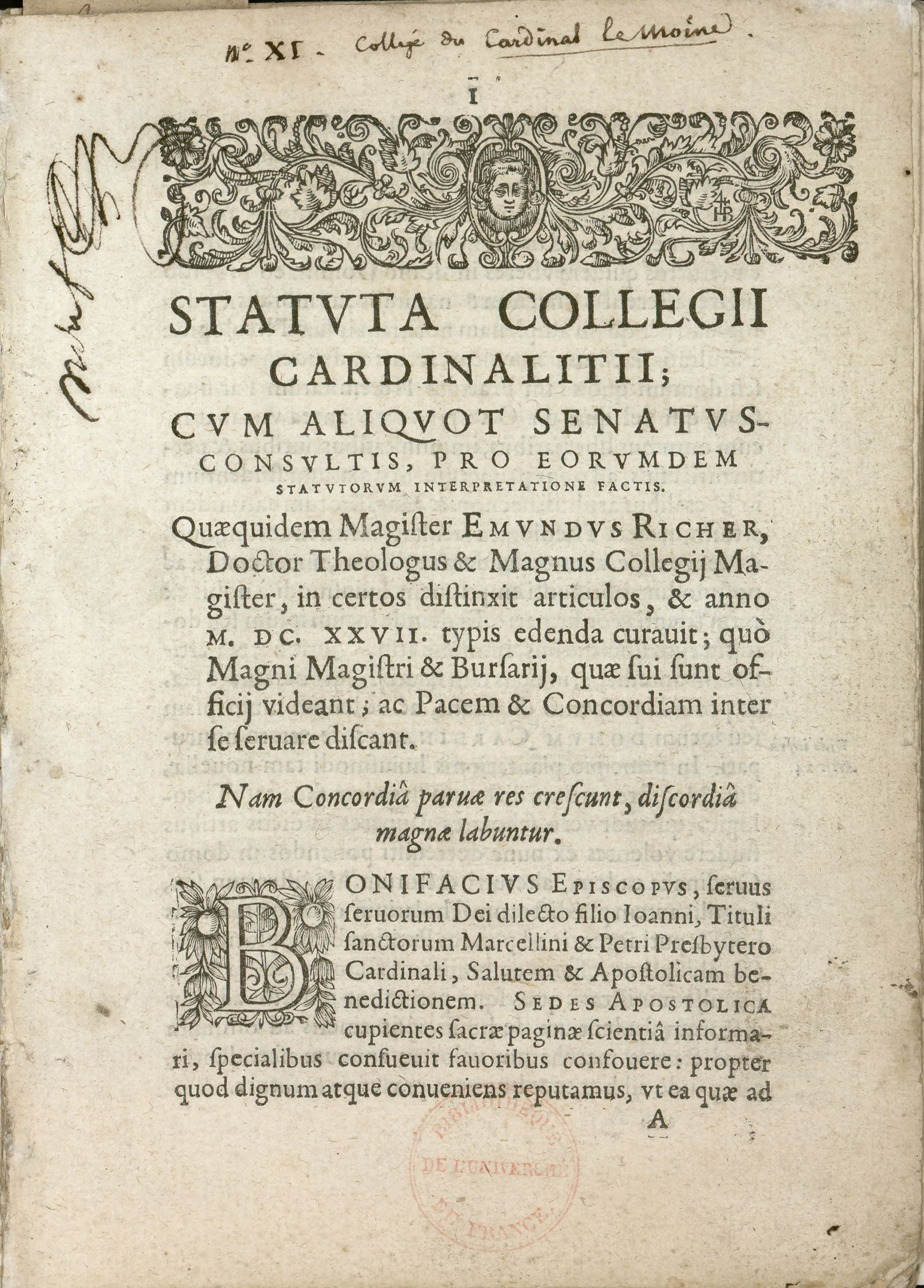 Monographie imprimée en latin, dans un registre de 738 feuillets consacré aux fondations et statuts des collèges.